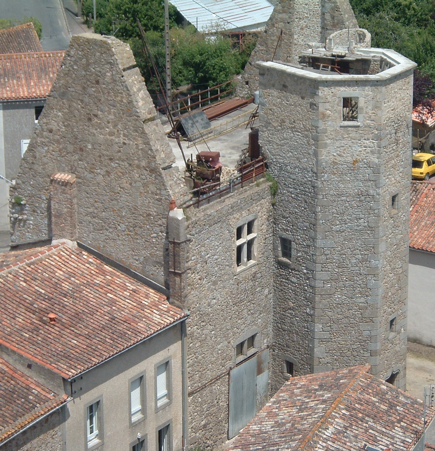 Le vieux château de Noirterre (Deux-Sèvres - France)